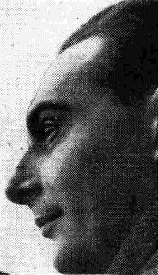 compositore e critico musicale italiano